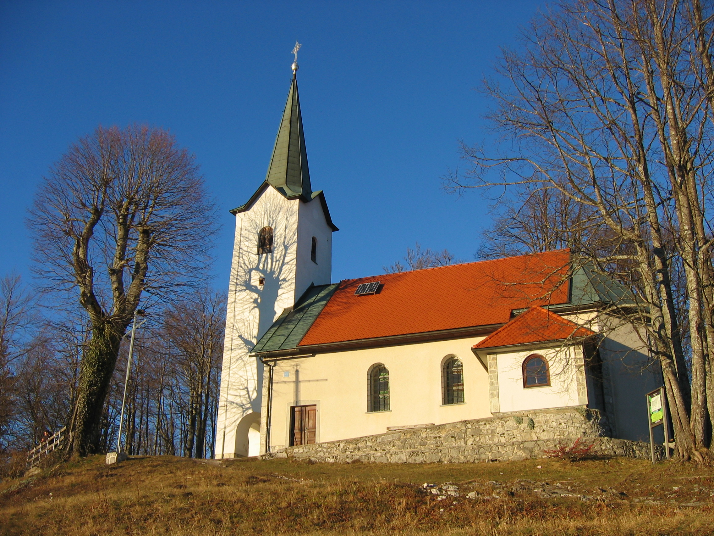 Cerkev Svete Ane na Mali gori nad Ribnico